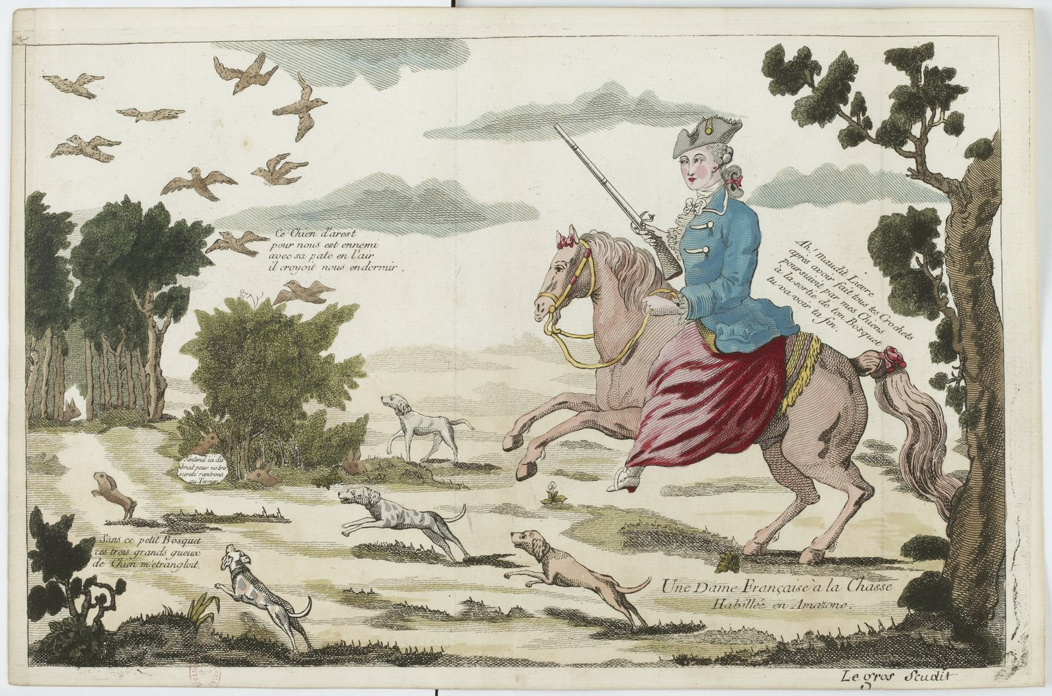 Legros de Rumigny: Une dame française à la chasse, habillée en amazone, 1768.